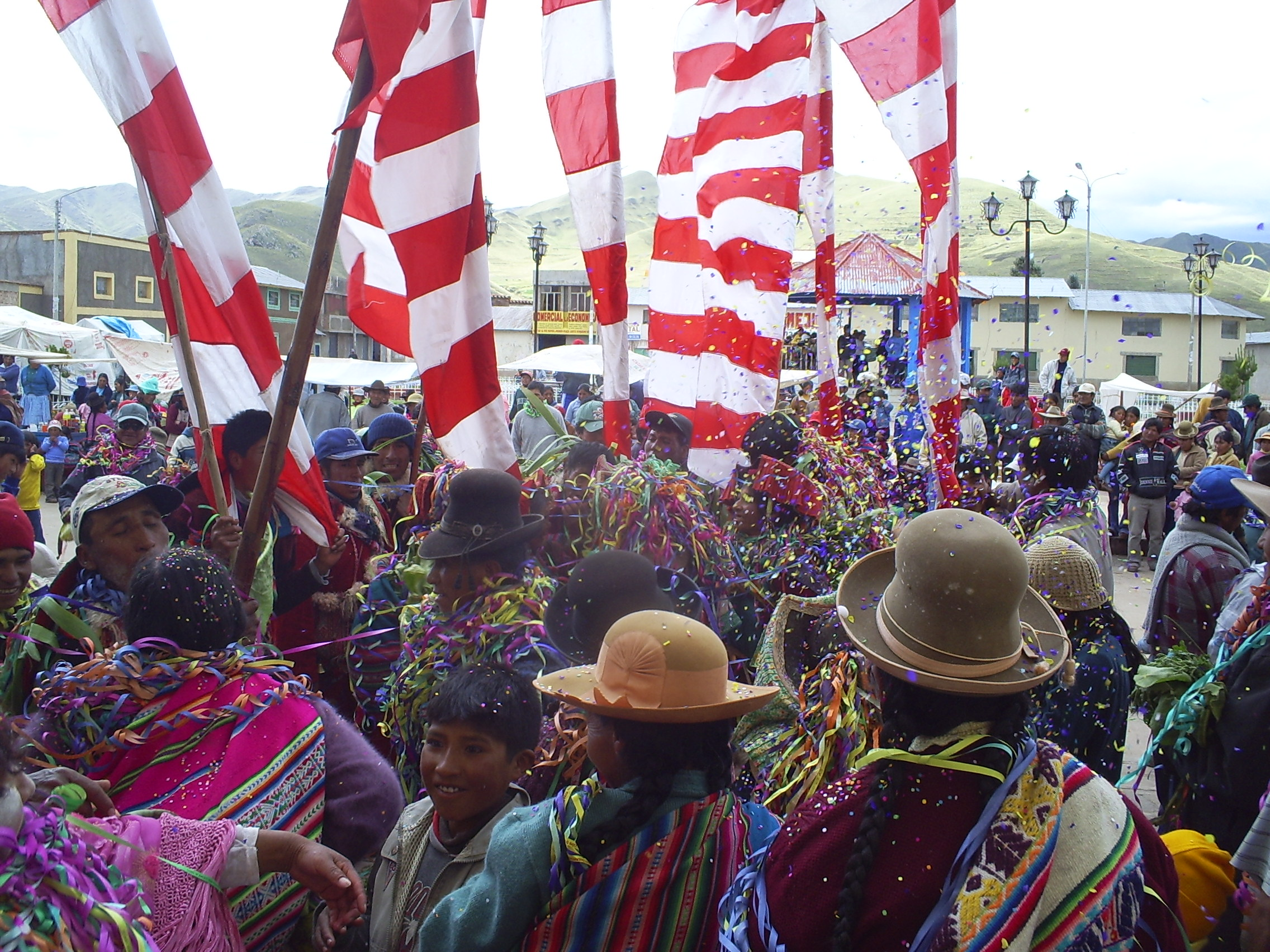 Carnavales de Macari. Runa Simi: Karnawal, Maqari.